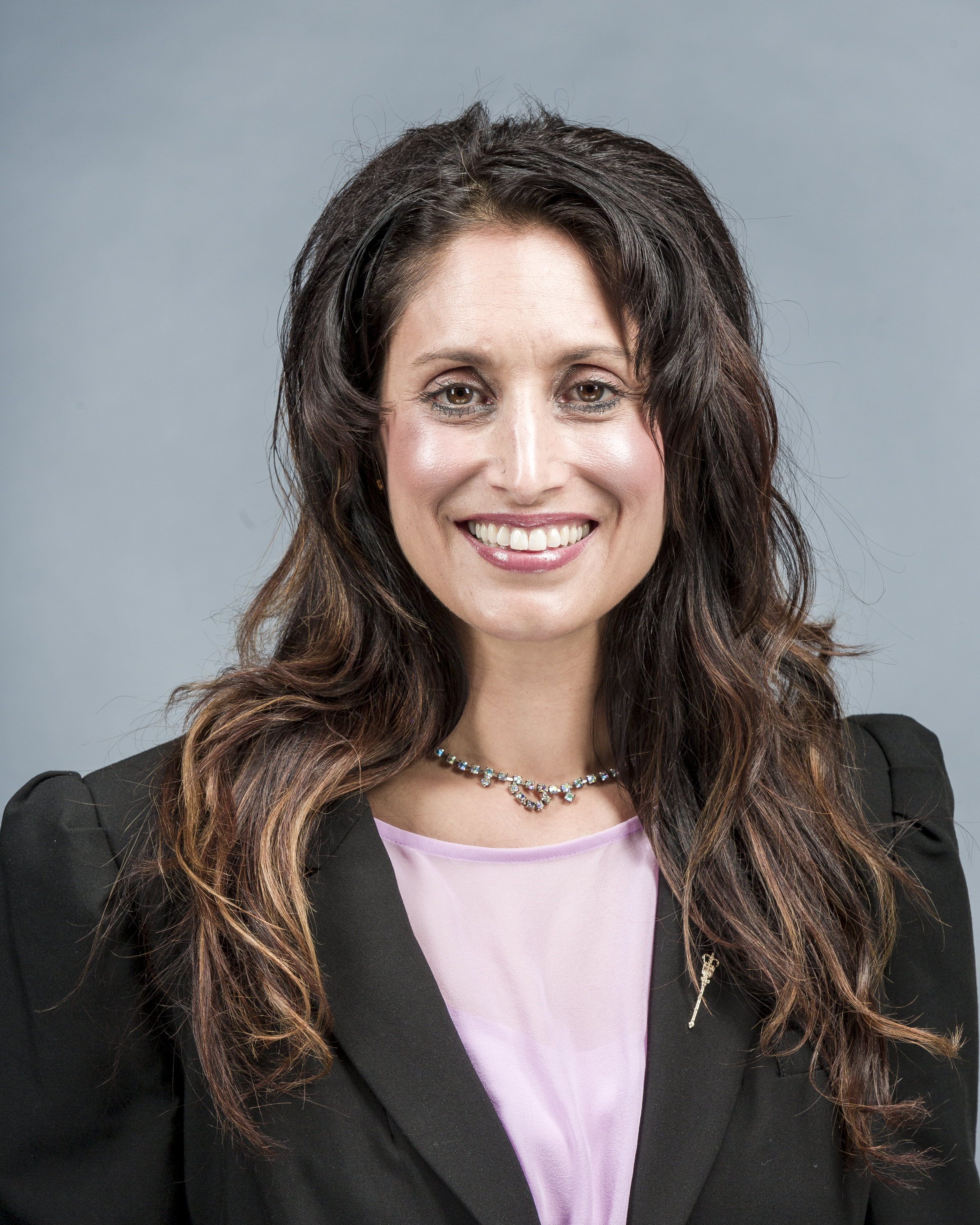 Alberta MLA Leela Aheer